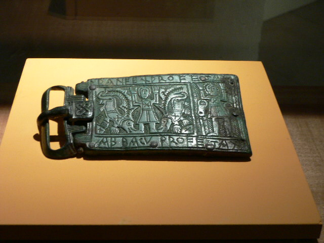 boucle de ceinture, bronze, France, période mérovingienne, musée des antiquités nationales, Saint-Germain-en-Laye